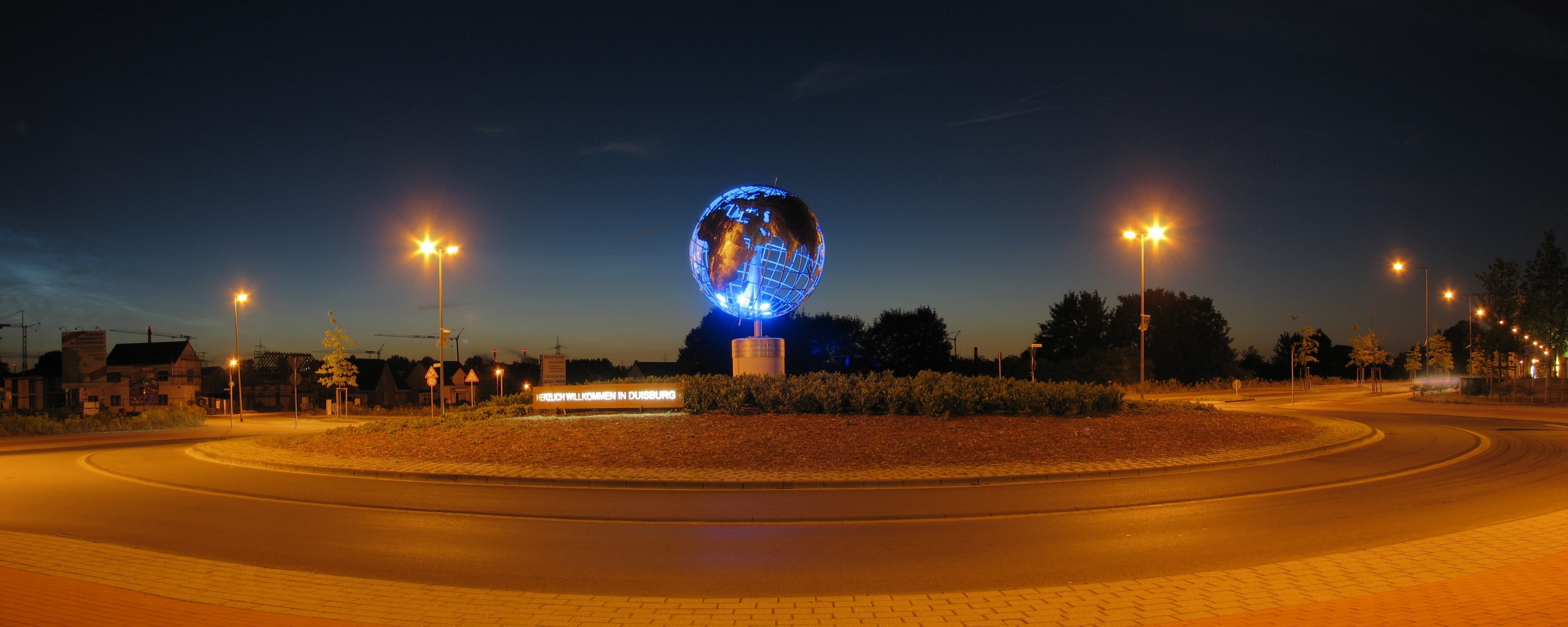 Der Weltmeisterkreisel mit dem Mercator-Globus in Huckingen bildet den südlichen Duisburger Stadteingang an der Grenze zu Düsseldorf (Nordrhein-Westfalen). Das Bild besteht aus neun Einzelbildern; jeweils drei wurden per Dynamic Range Increase zu einem Bild überlagert, die drei Ergebnisbilder dann zu einem Panorama gestitcht.